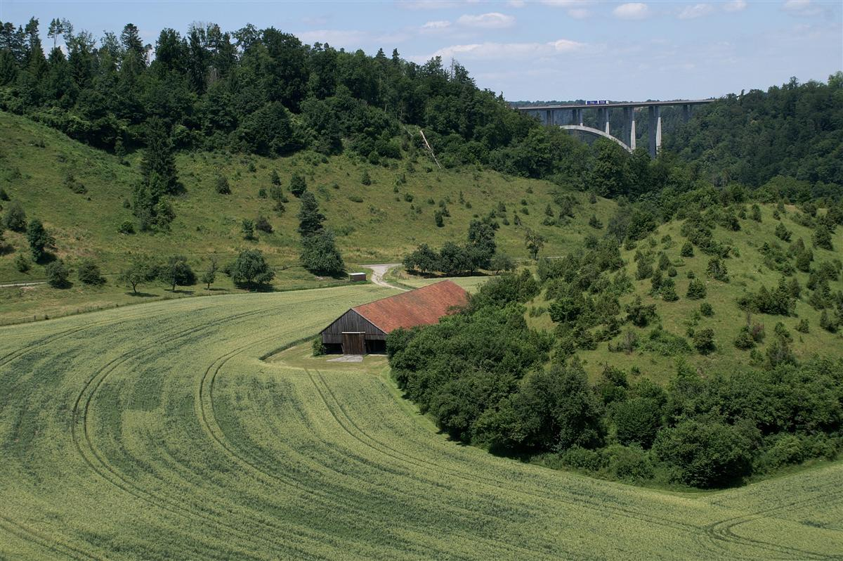 Neckartal + Neckartalbrücke